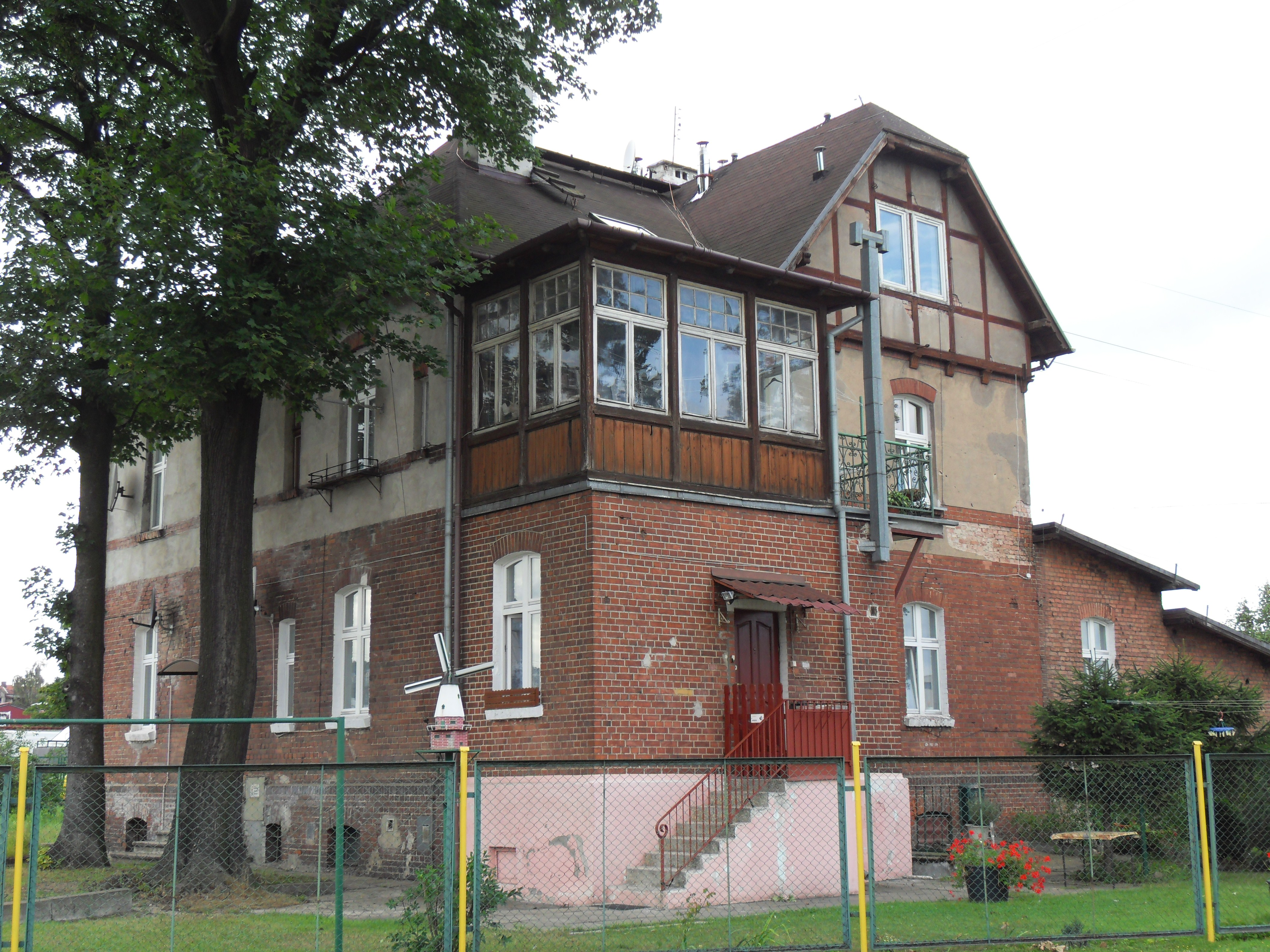 Gdańsk Przymorze Małe, ul. Śląska 3.